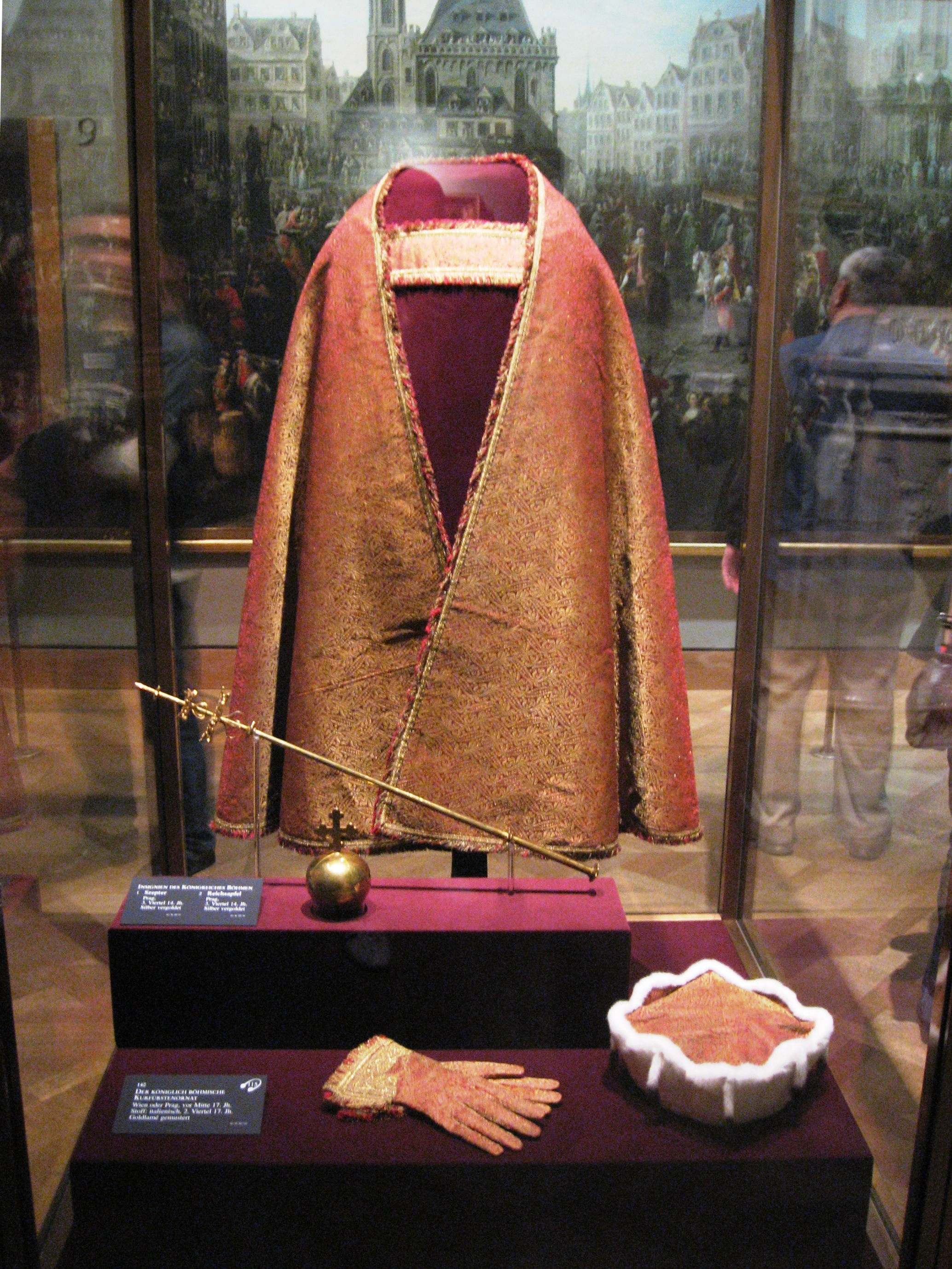 Der Königlich Böhmische Kurfürstenornat. Wien oder Prag, vor Mitte des 17. Jahrhunderts. Stoff: italienisch, 2. Viertel des 17. Jahrhunderts. Goldlamé gemustert. Inv. Nr. XIV 122.